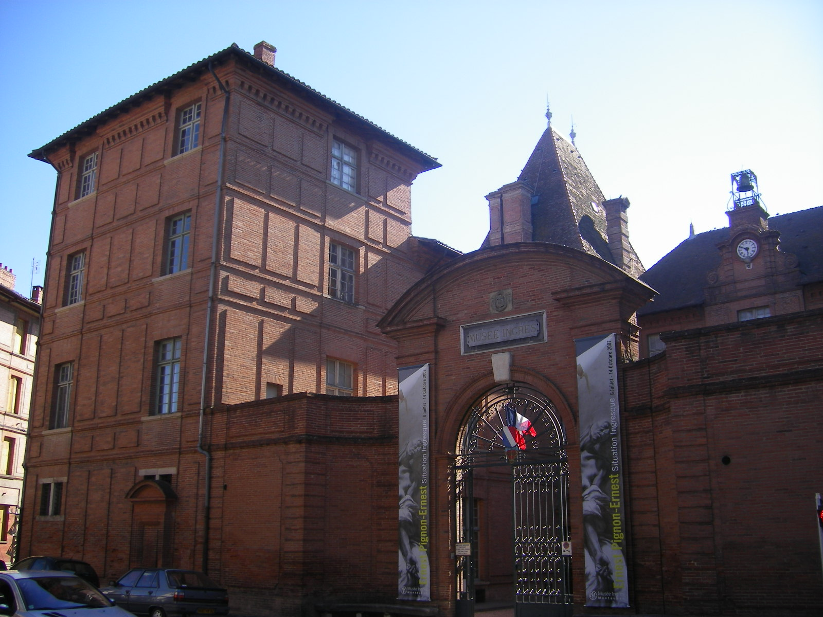 Montauban, Musée Ingres